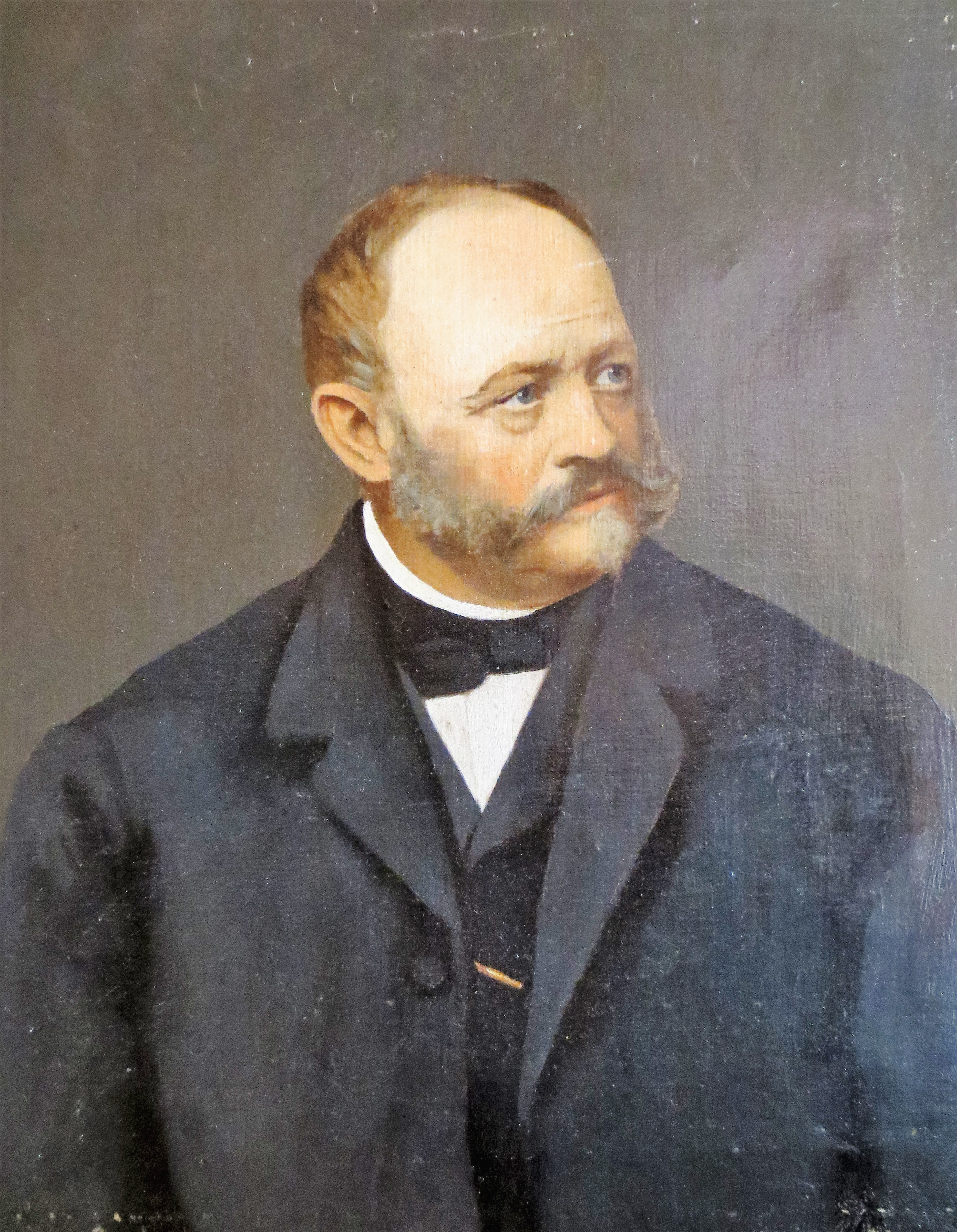 Portrait des Fürsten Alexander zu Sayn-Wittgenstein-Hohenstein, gemalt 1864